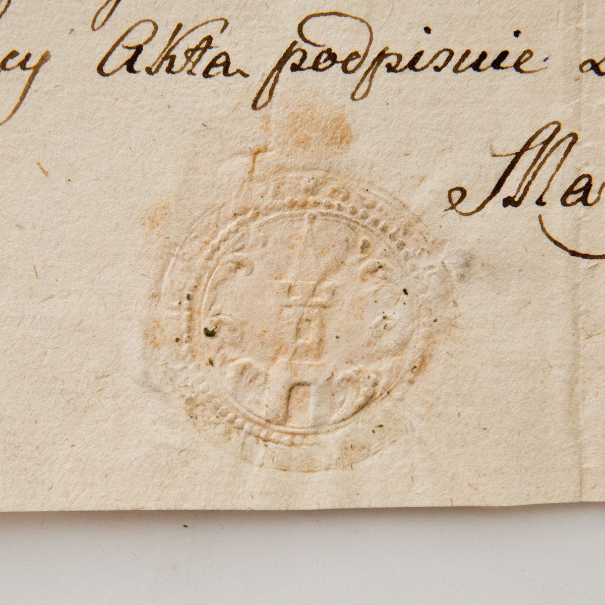 Pieczęć Radoszyc z XVIII wieku